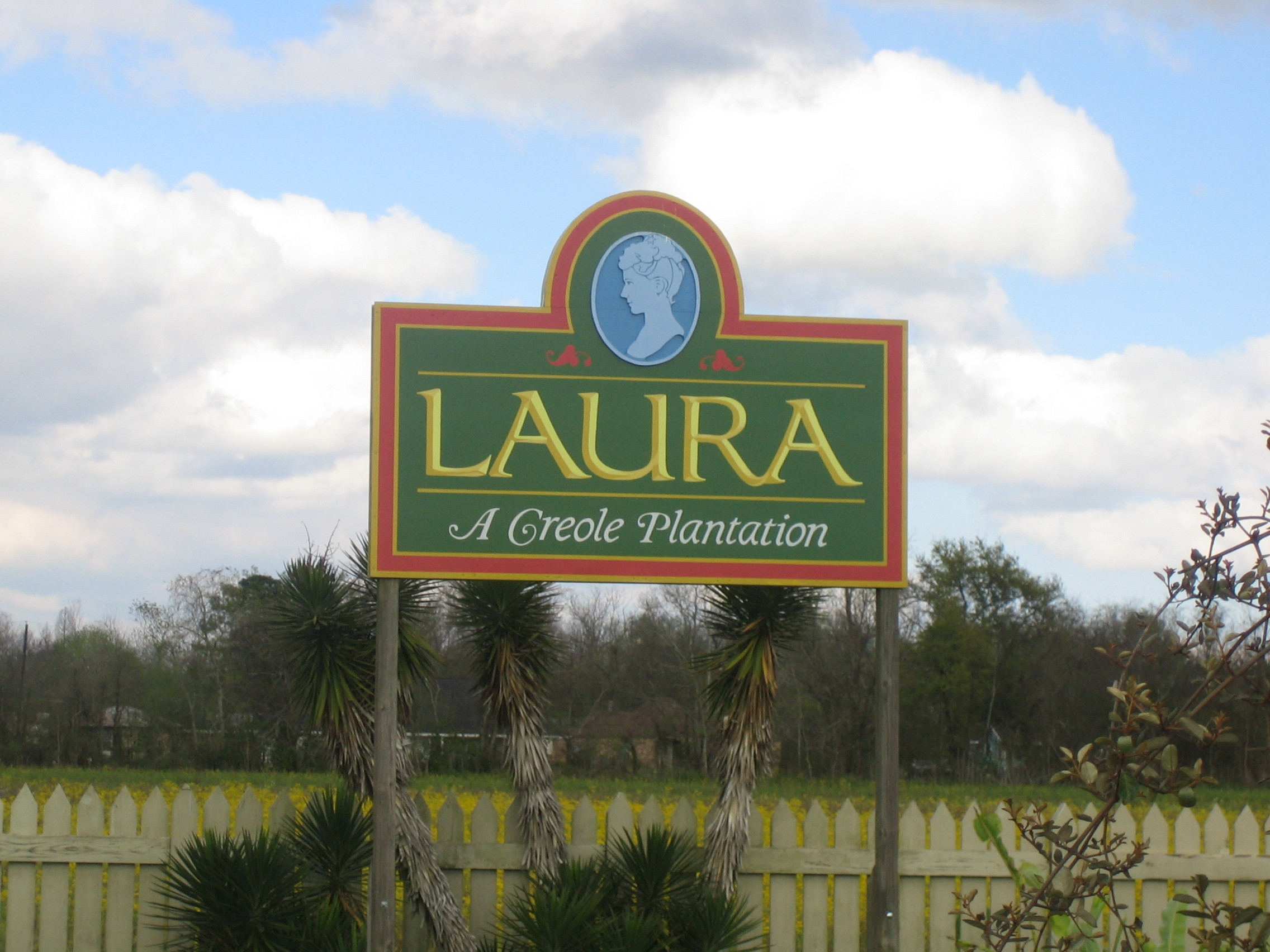 Kuva Laura Plantaasin plakaatista Vacherie Lousianassa. Valokuva otettu itse vuonna 27.03.2005.